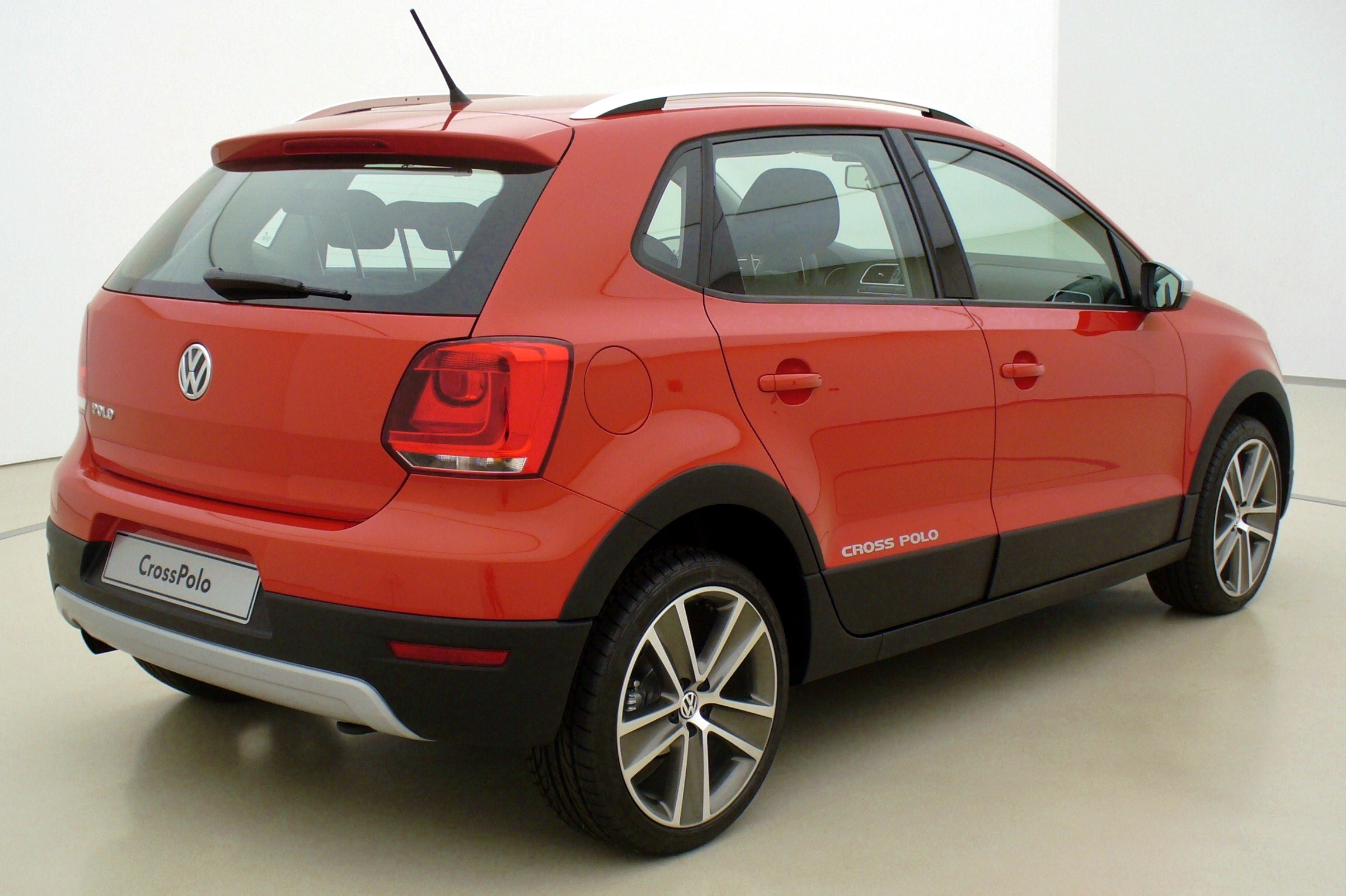 VW CrossPolo V Heck